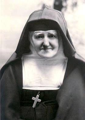 La servante de Dieu Léonie Martin, sœur visitandine sous le nom de Françoise-Thérèse.